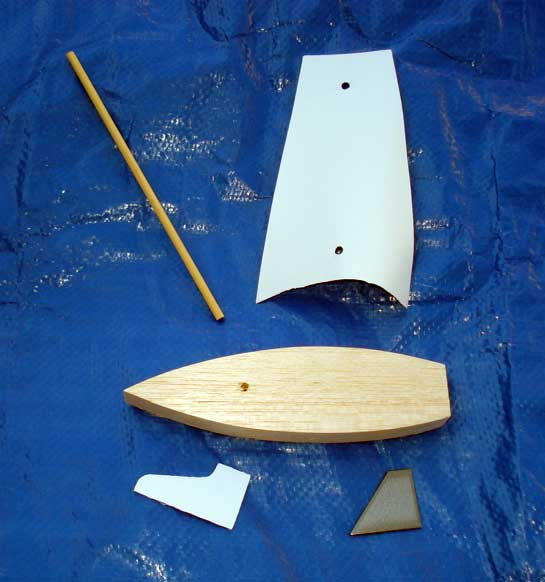 Raingutter Regatta kit